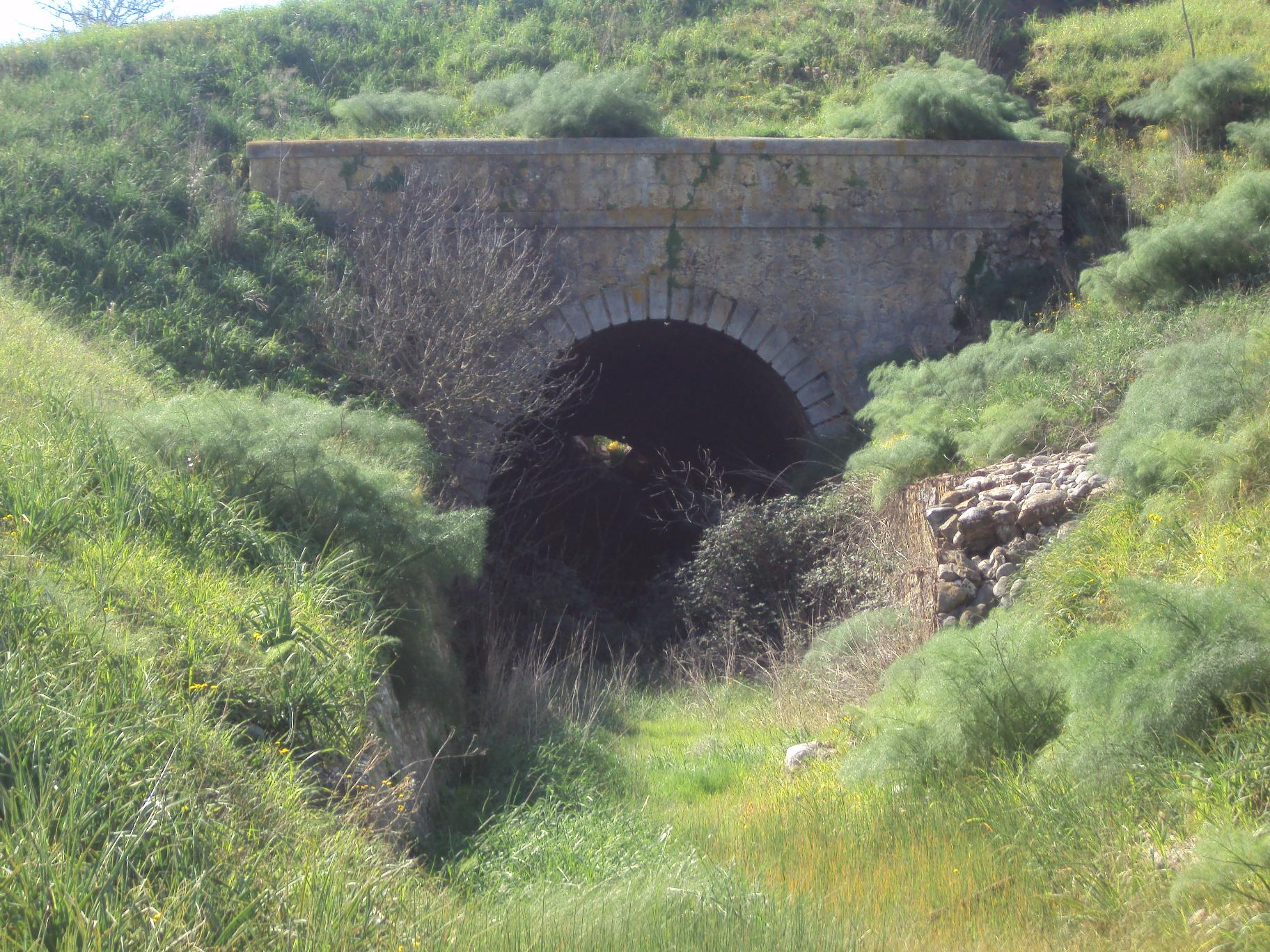 Galleria Apriglianello sulla linea dismessa Crotone - Petilia Policastro